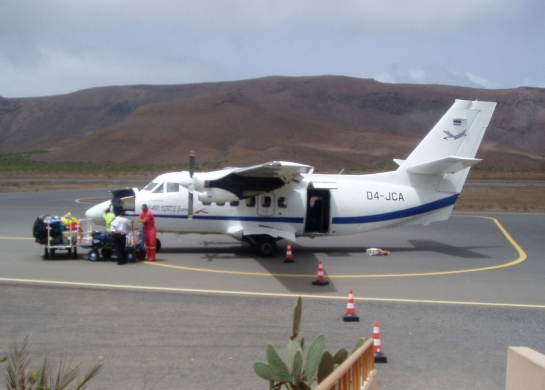 Avião Let L-410 (D4-JCA) no aeródromo de Preguiça, São Nicolau - Cabo Verde